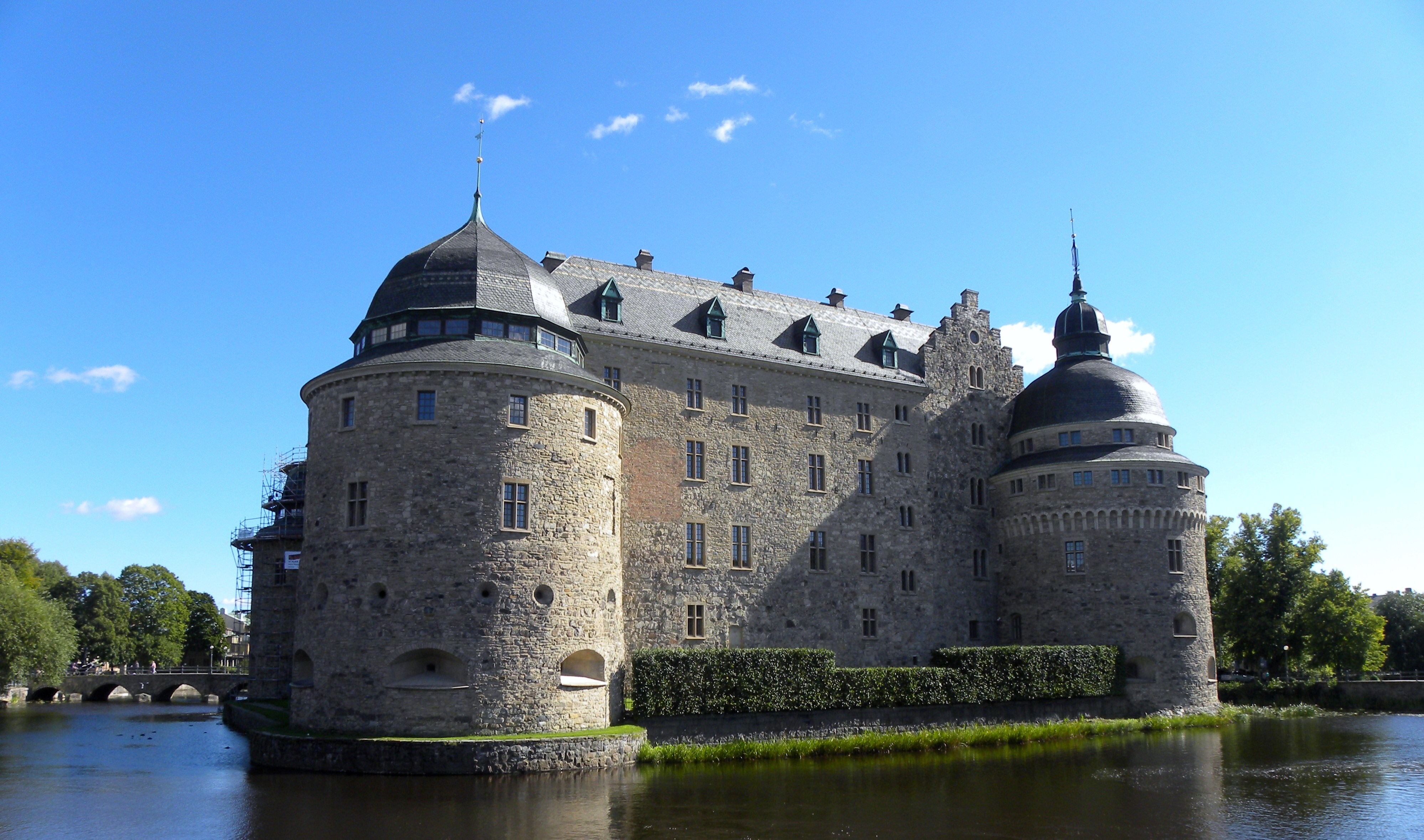 Örebro slott 2012